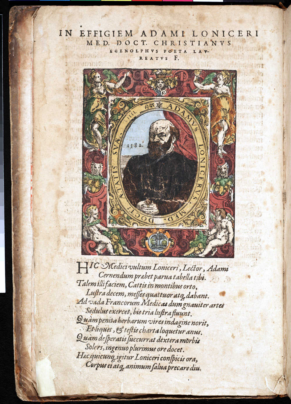 Adam Lonicerus' portrait